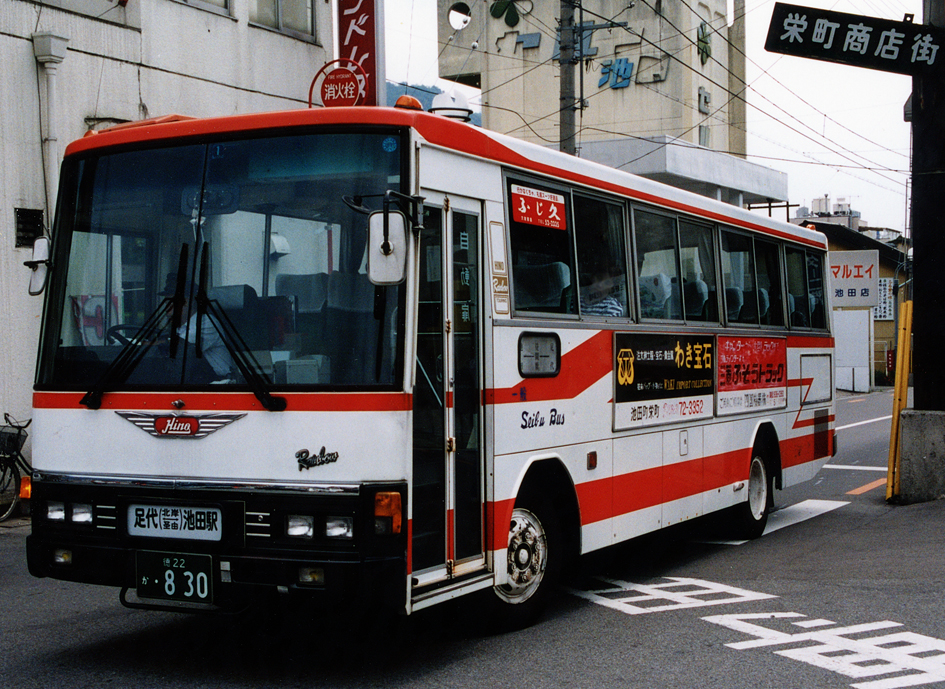 徳島西部交通 日野・レインボー RR P-RR172B 北岸線 阿波池田駅前付近